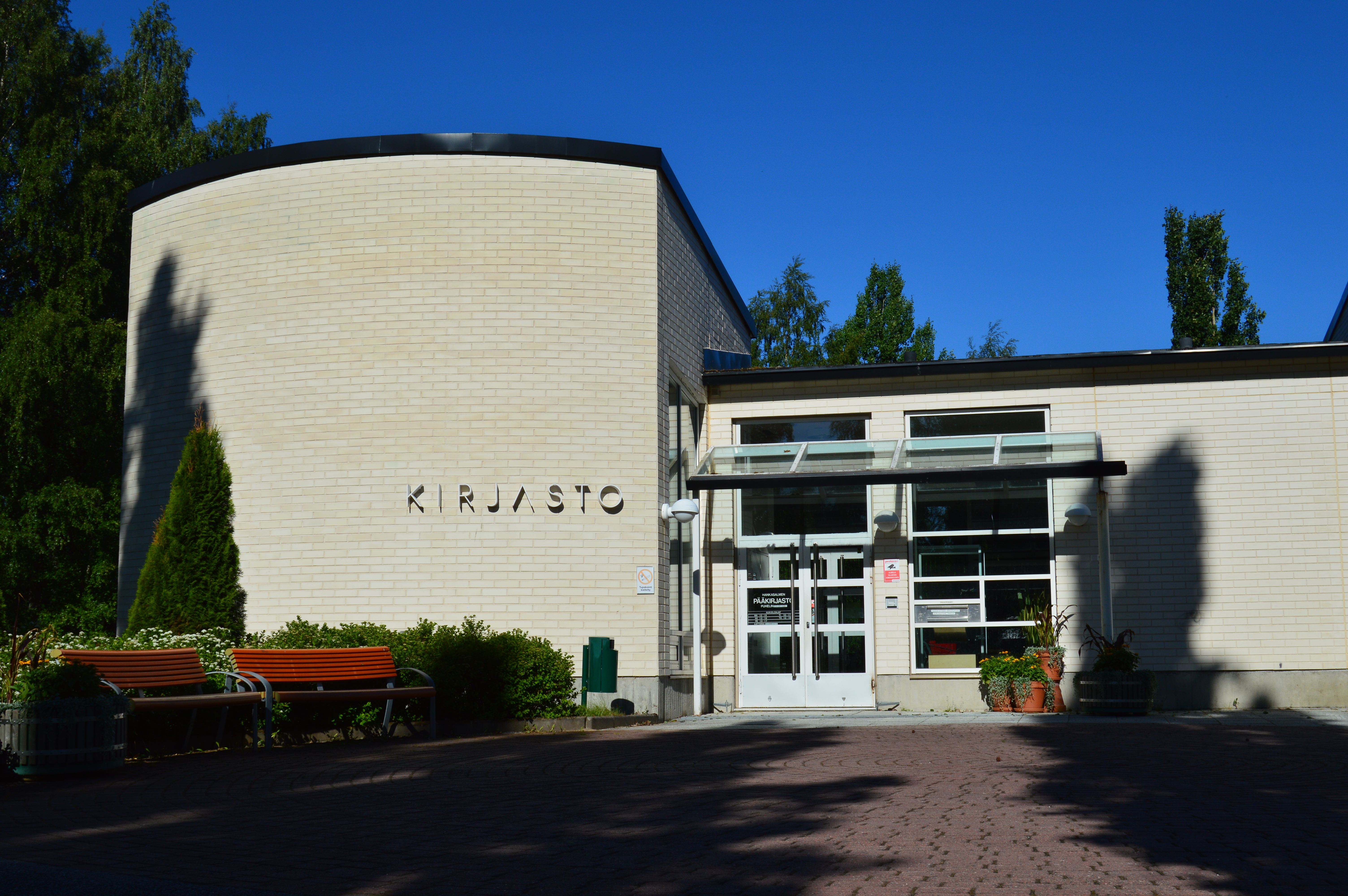 Hankasalmen pääkirjasto, kirjastotalo. Arkkitehti Saara Juola, valmistumisvuosi 1993.